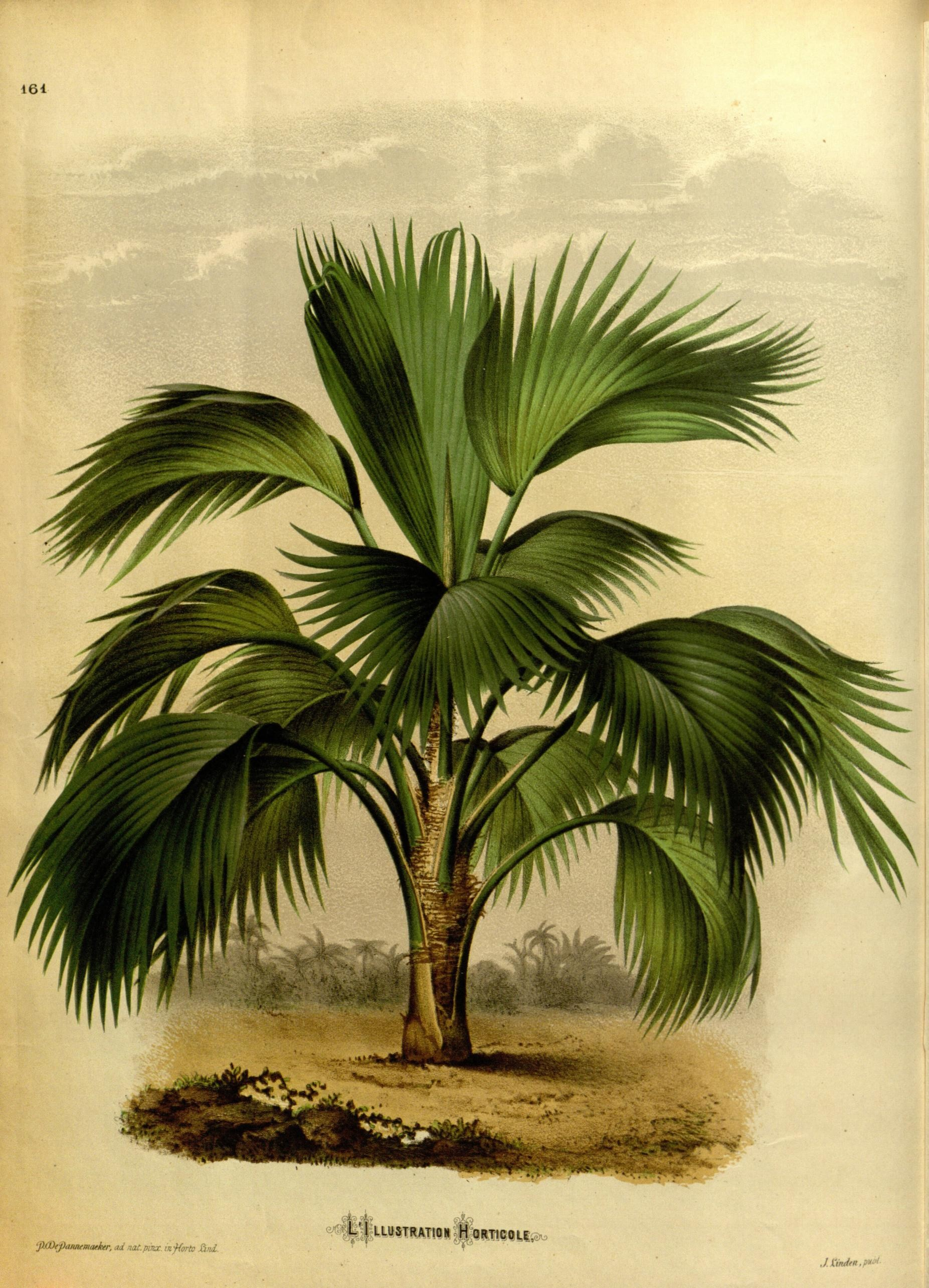 u LUSTRATION H ORTICOLE.